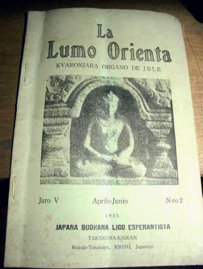 La foto estis eldonita en Ponteto (Bulteno de Esperanto-Ligo en Regiono Kantoo) n-ro 258 (2013) en la artikolo "Amikeco inter japana bonzo kaj honkonga budhano dum la dua Mondmilito" verkita de Tigro. La bulteno estis verŝajne trovita inter la havaĵoj de la bonzo Utsuki Nishū.